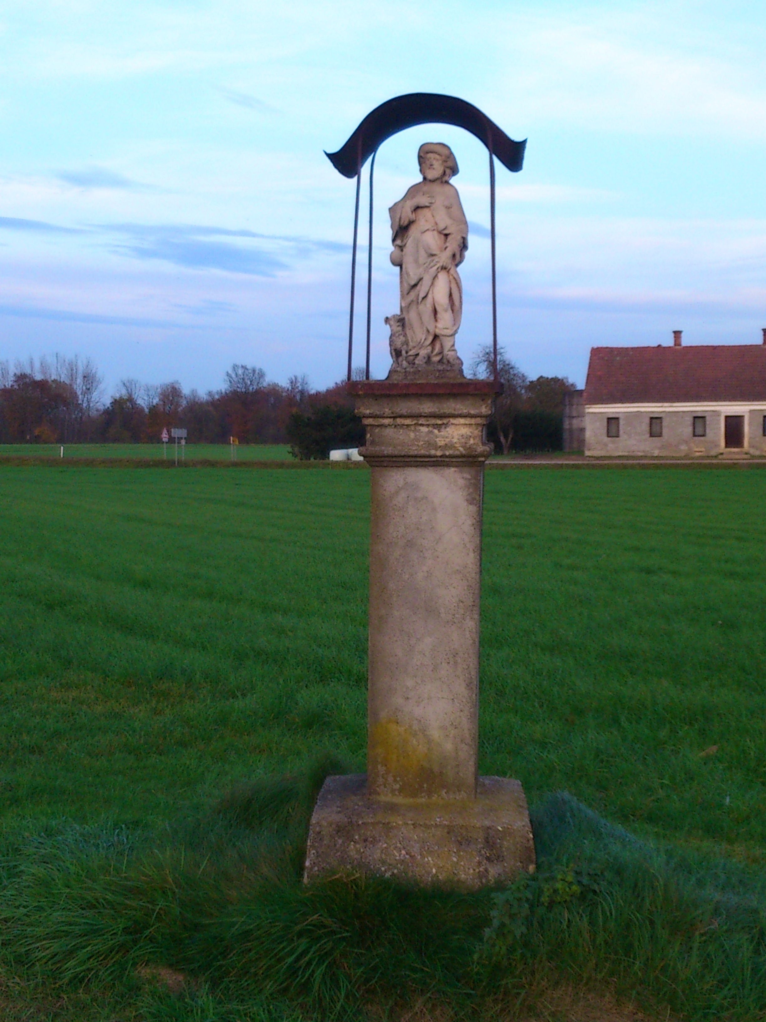 Spomenik sv. Roka postavljen leta 1681 in se nahaja severozahodno od jedra Vučje vasi. Svetnik je upodobljen v baročni maniri kot romar, s psom in z rano na nogi.